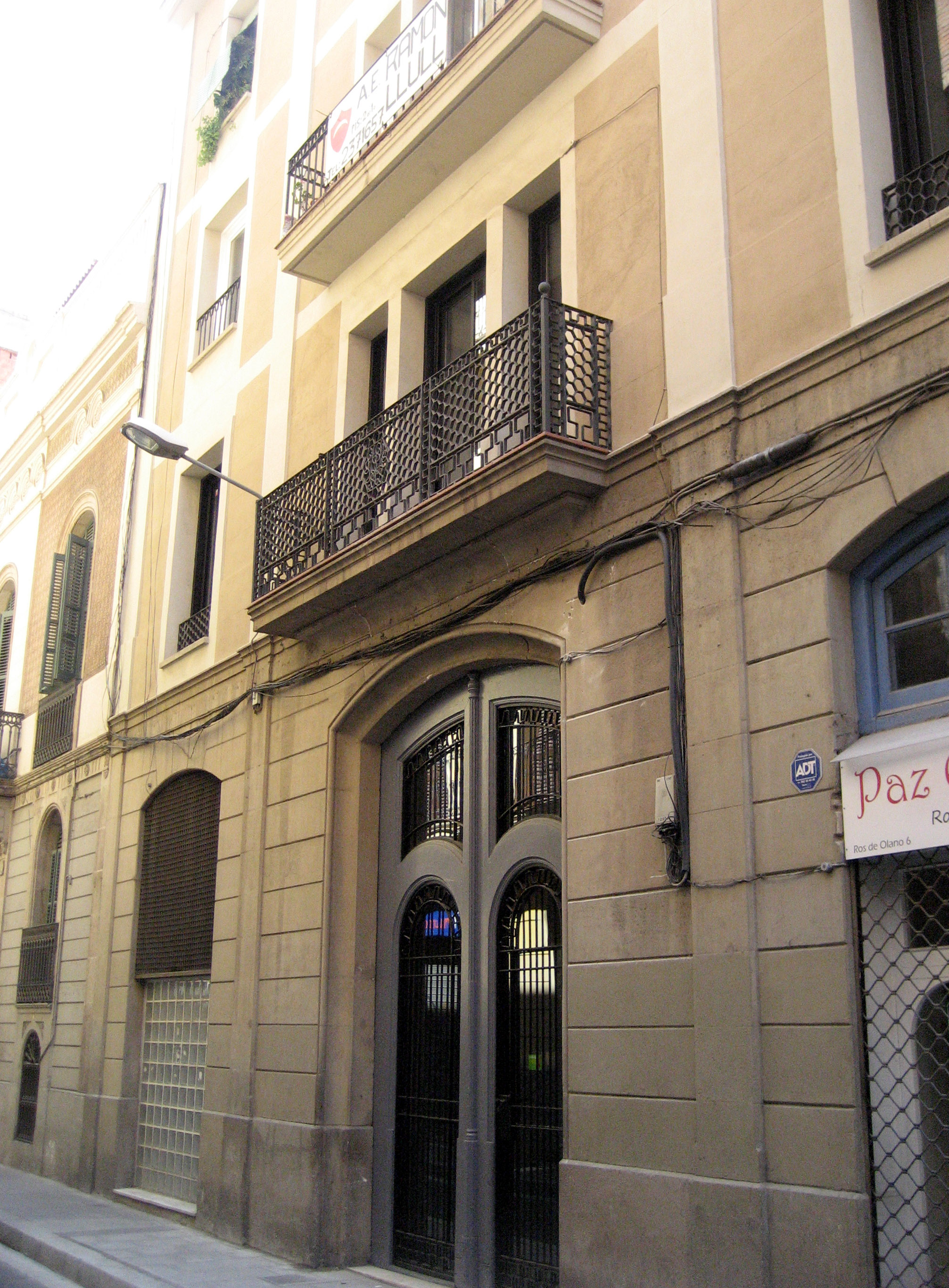 Porta d'accés al que fou el Club Helena, carrer Ros de Olano (Gràcia)_agost 2009